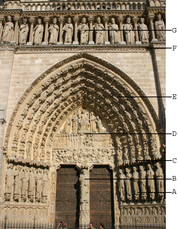 Notre-Dame de Paris, westfront, portal of the last judgement + numbers